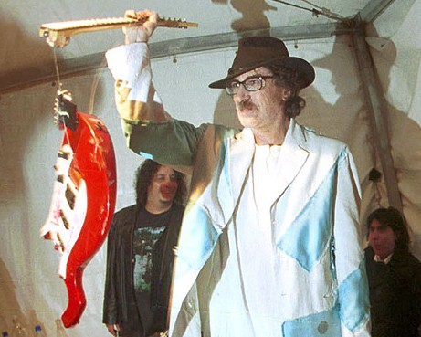 Charly García. En la Casa Rosada. Buenos Aires. Argentina. 25 de mayo de 2004. foto oficial